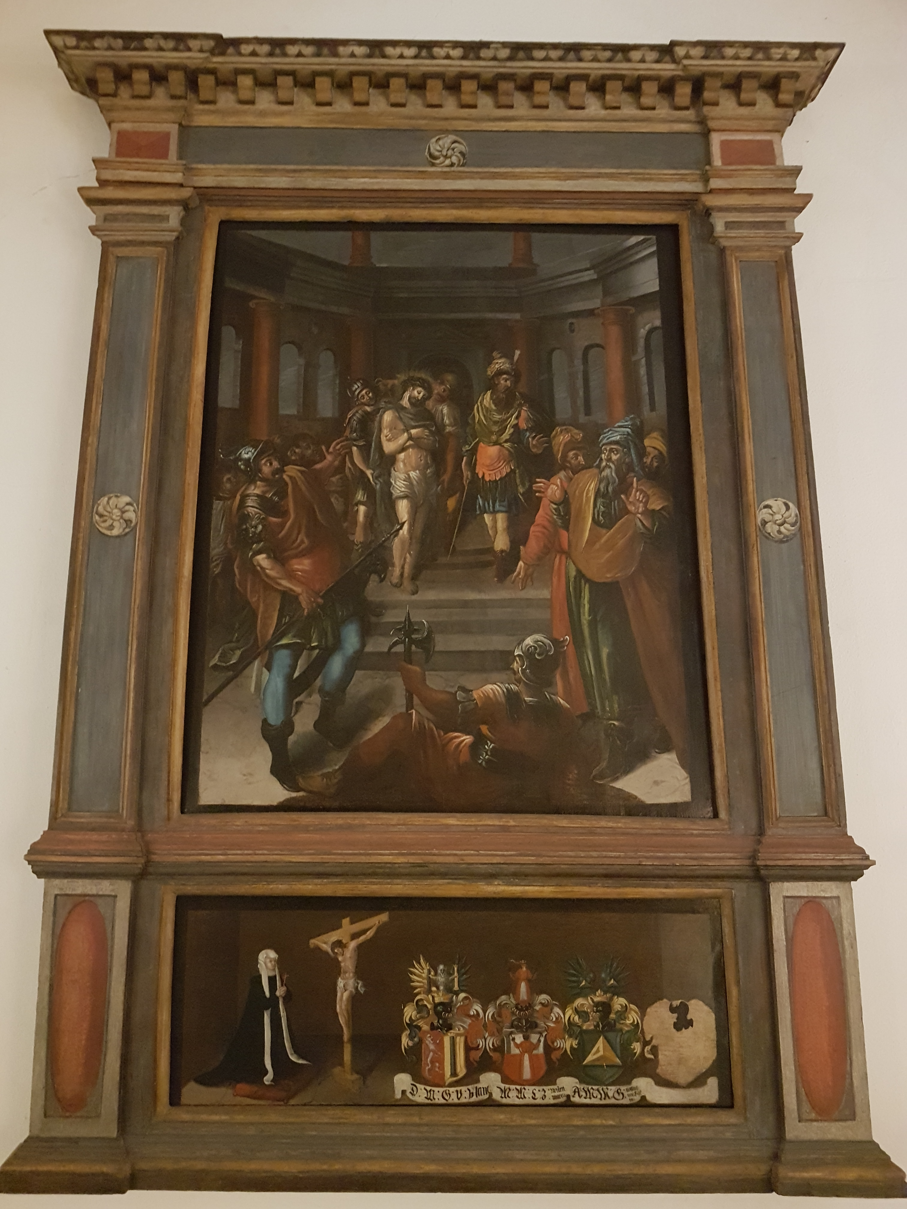 Augustiner-Chorherrenstift Altötting